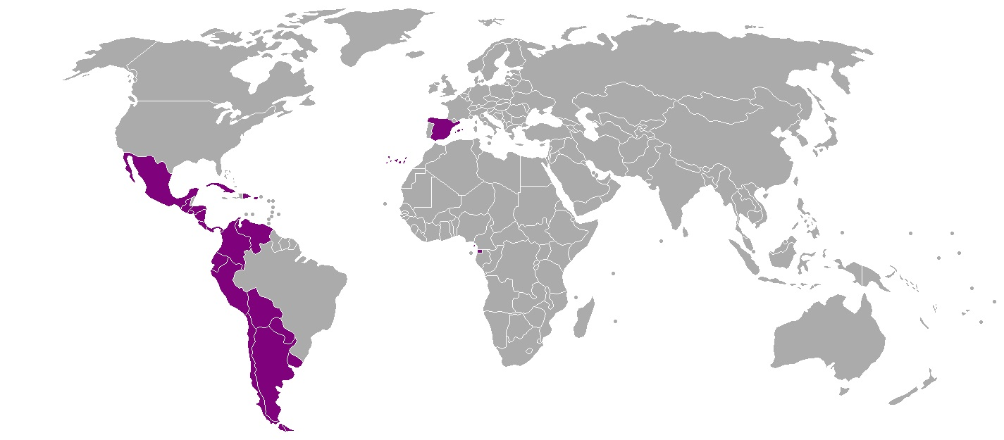 Zasięg terytorialny języka hiszpańskiego (tzw. Hispanofonía)